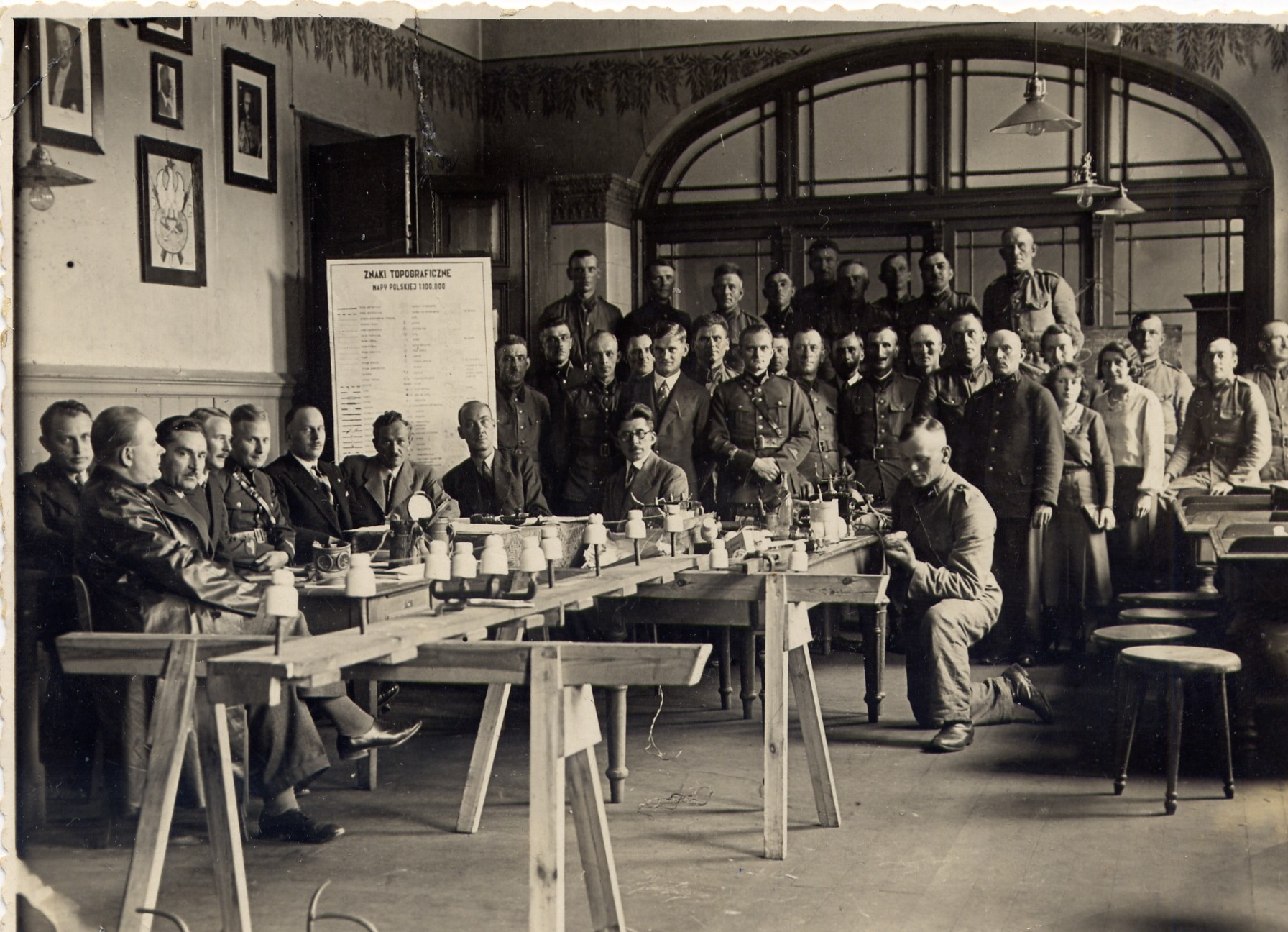 Egzaminy z topografii i łączności Ludwik 1930. Zdjęcie w moim posiadaniu. Foto-skan mojego autorstwa z mojego albumu rodzinnego